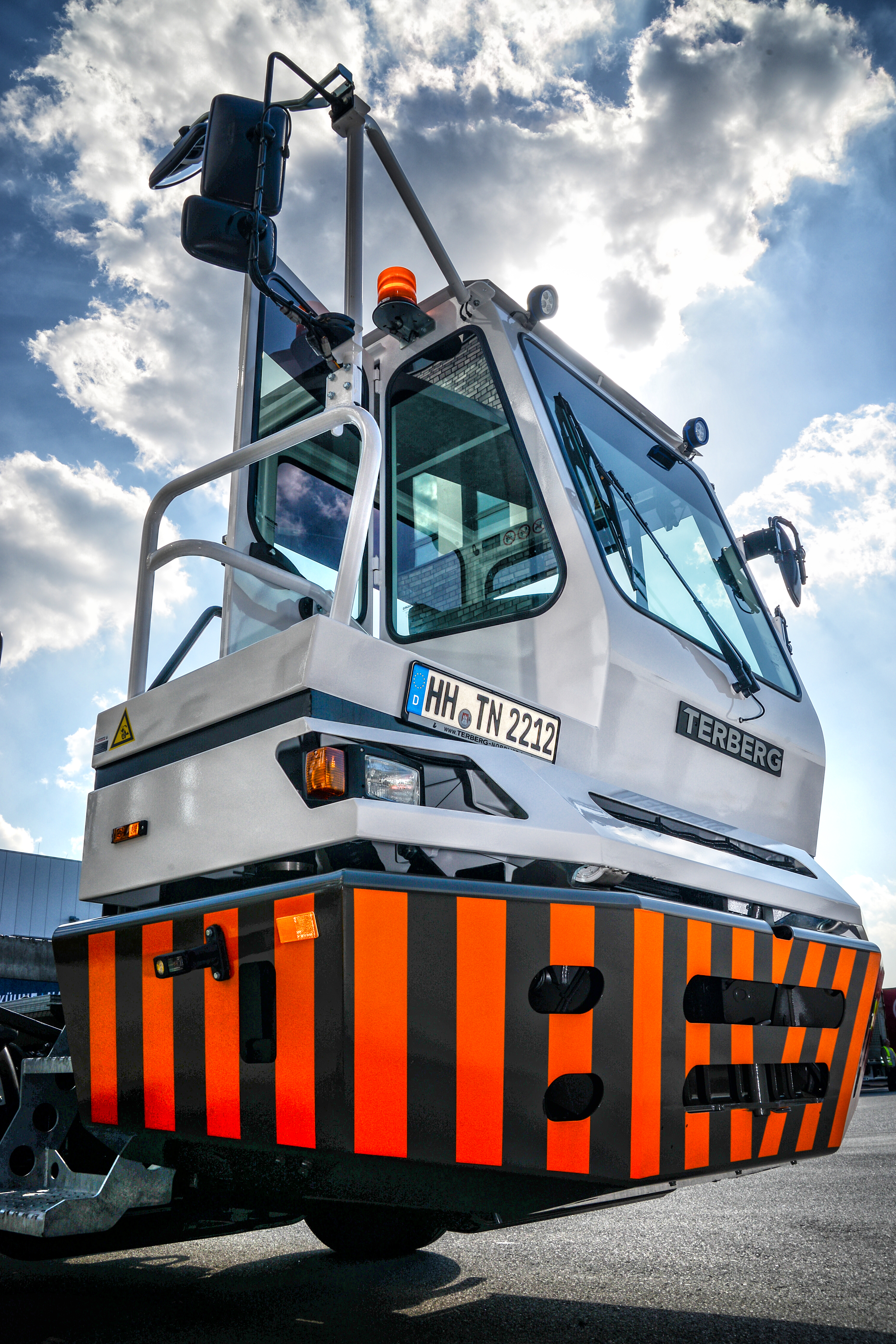 Der TERBERG Wechselbrückenumsetzer wurde speziell für das sichere und schnelle Umsetzen von Wechselkoffern entwickelt. Die BC Baureihe erlaubt Hubtischkapazitäten bis 25 Tonnen und Sattelkupplungskapazitäten von 16 Tonnen. Der kurze Wendekreis und der hydraulisch heb- und senkbare Hubrahmen, auf dem variable Wechselbehältertypen untergebracht werden können, ermöglichen breite Einsatzfelder bei Logistik- und Transportaufgaben. Wie bei den TERBERG Zugmaschinen auch, ist die BC Baureihe mit einer besonders sicheren, geräumigen und komfortablen Fahrerkabine ausgestattet.